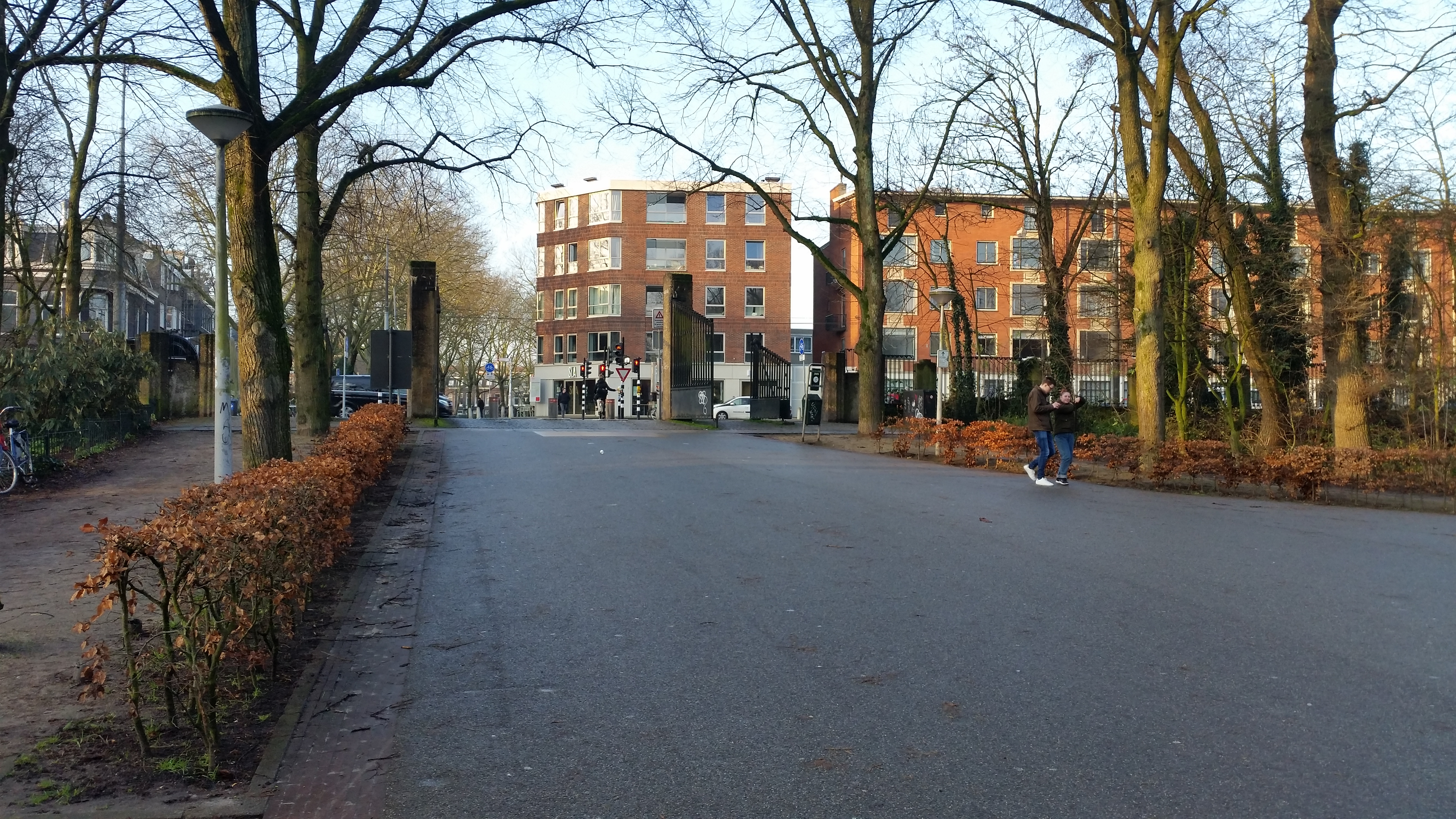 Toegangshek Vondelpark-Amstelveenseweg; gezien vanuit het park